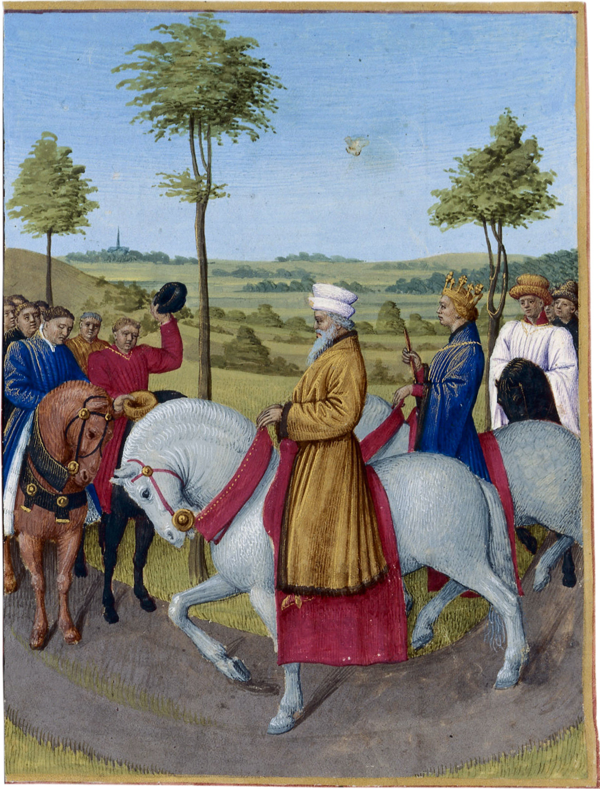 L'empereur Charles IV et les dignitaires de Paris Grandes Chroniques de France, enluminées par Jean Fouquet, Tours, vers 1455-1460 Paris, BnF, département des Manuscrits, Français 6465, fol. 442v. (Livre de Charles V) Le 4 janvier 1378, l'empereur Charles IV et son fils Wenceslas rencontrent, entre Saint-Denis et La Chapelle-Saint-Denis, le prévôt de Paris, le prévôt des marchands, le chevalier du guet, les échevins et les bourgeois de la ville de Paris envoyés par le roi à leur rencontre.